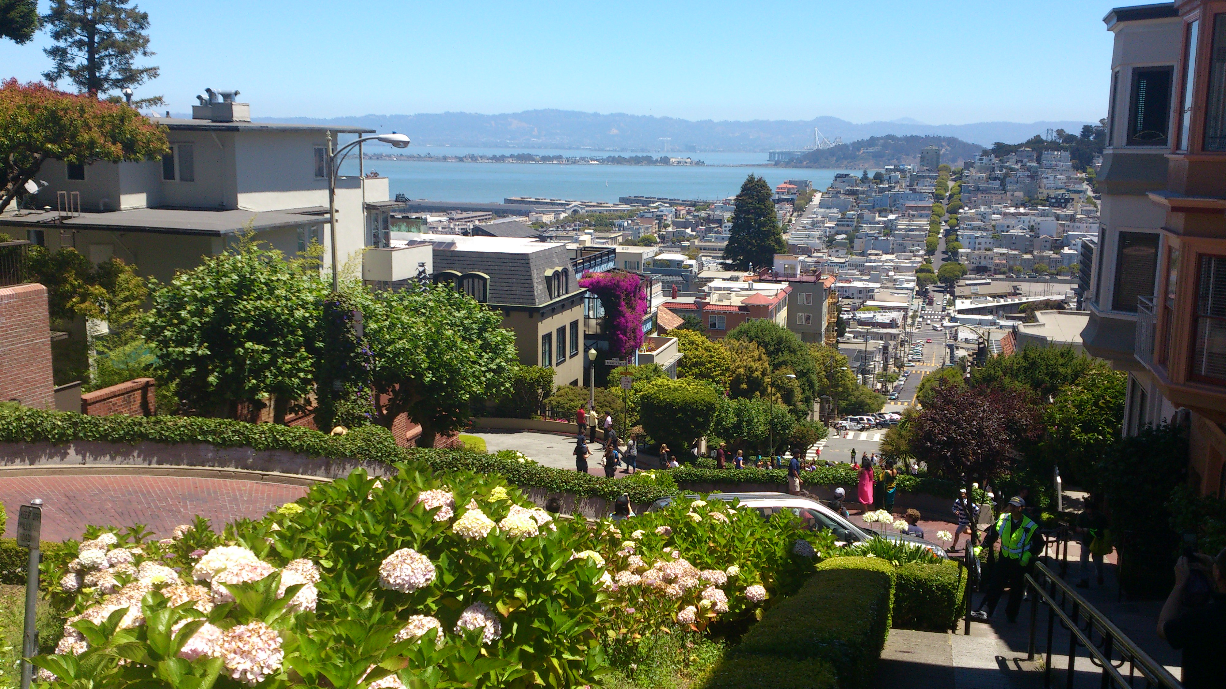 San Francisco von der oberen Lombard Street aus